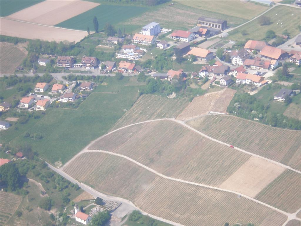 Village de Bellerive, Vaud, Switzerland